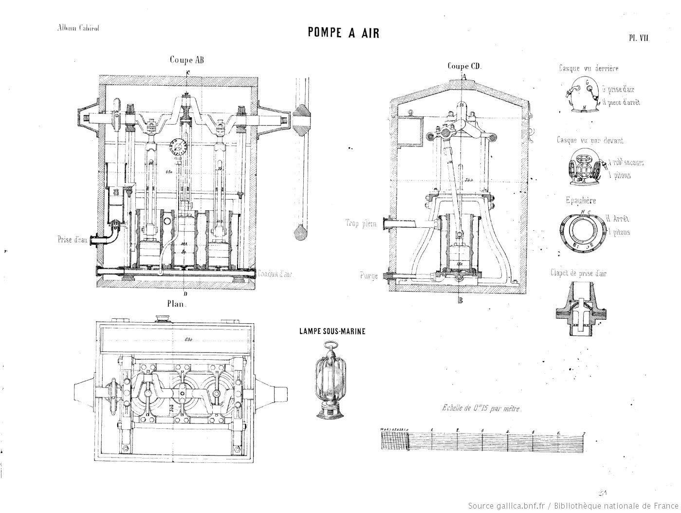 Scaphandre appareil de plongeur Cabirol Cabirol Joseph-Martin